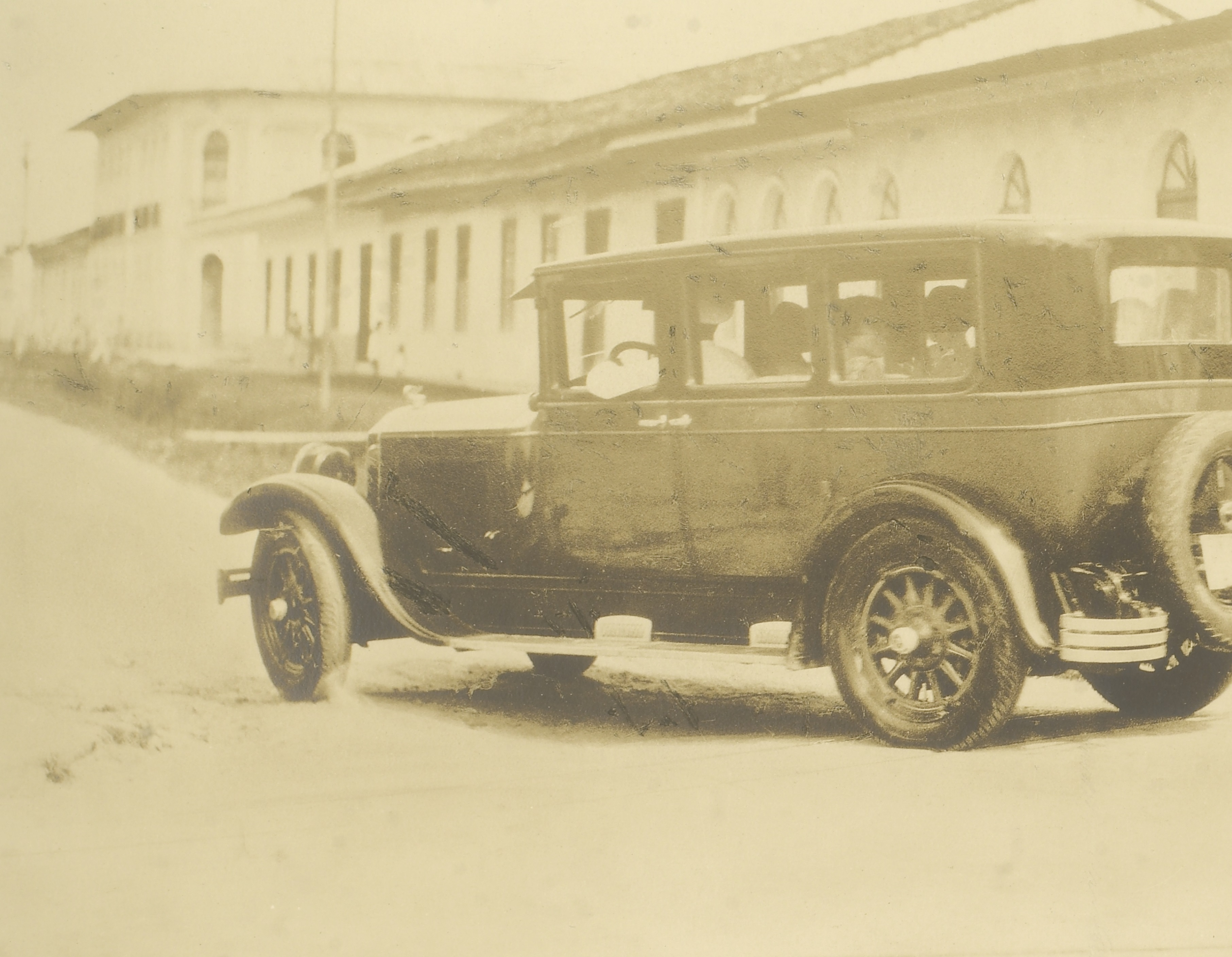 Imagem do Fundo Ministério da Guerra, do Arquivo Nacional